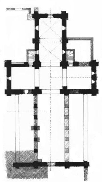 Plan avant 1850 (la façade est en bas et le chevet en haut).